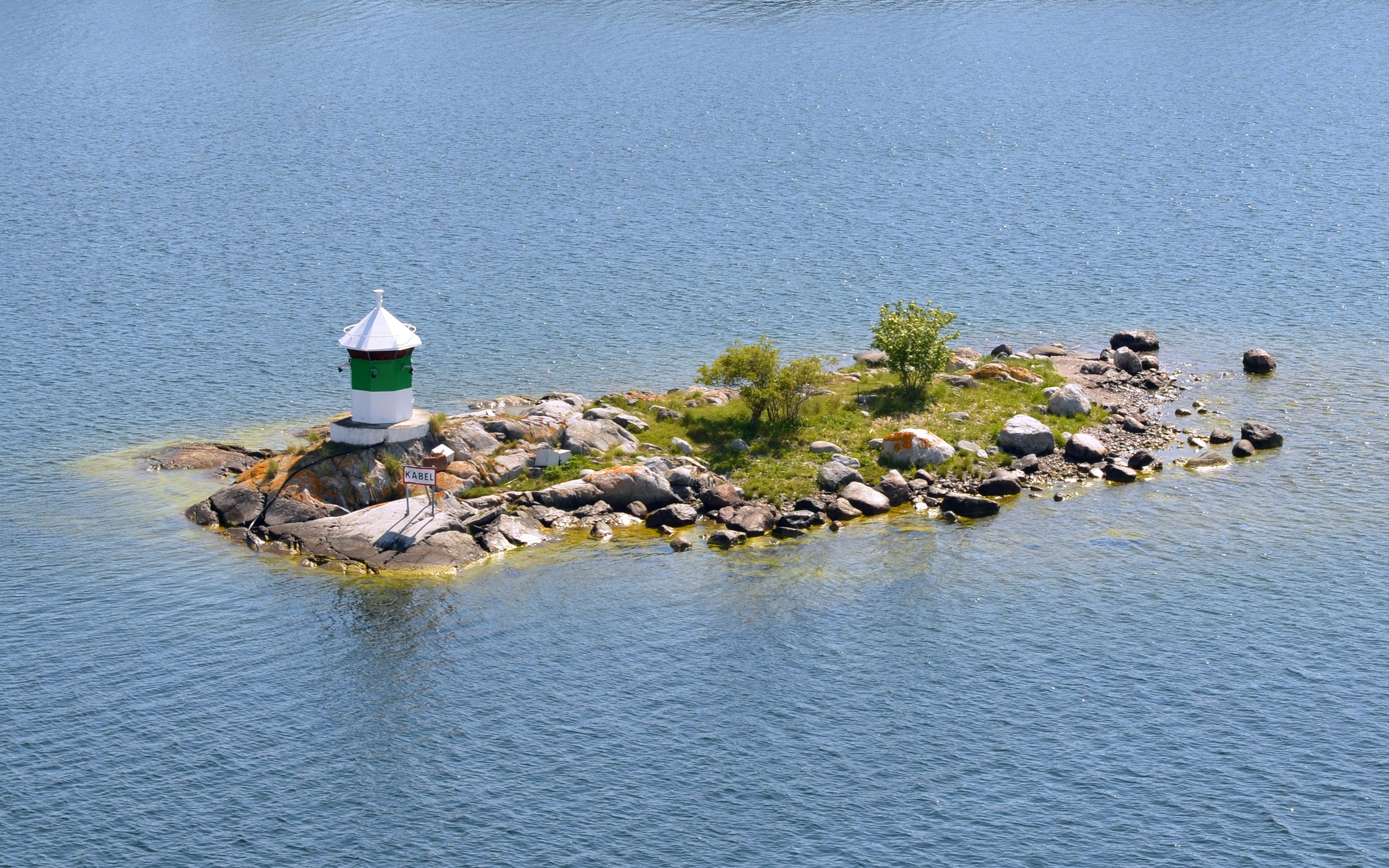 Fyren på Riksdalerskäret vid Dalarö i Stockholms skärgård.